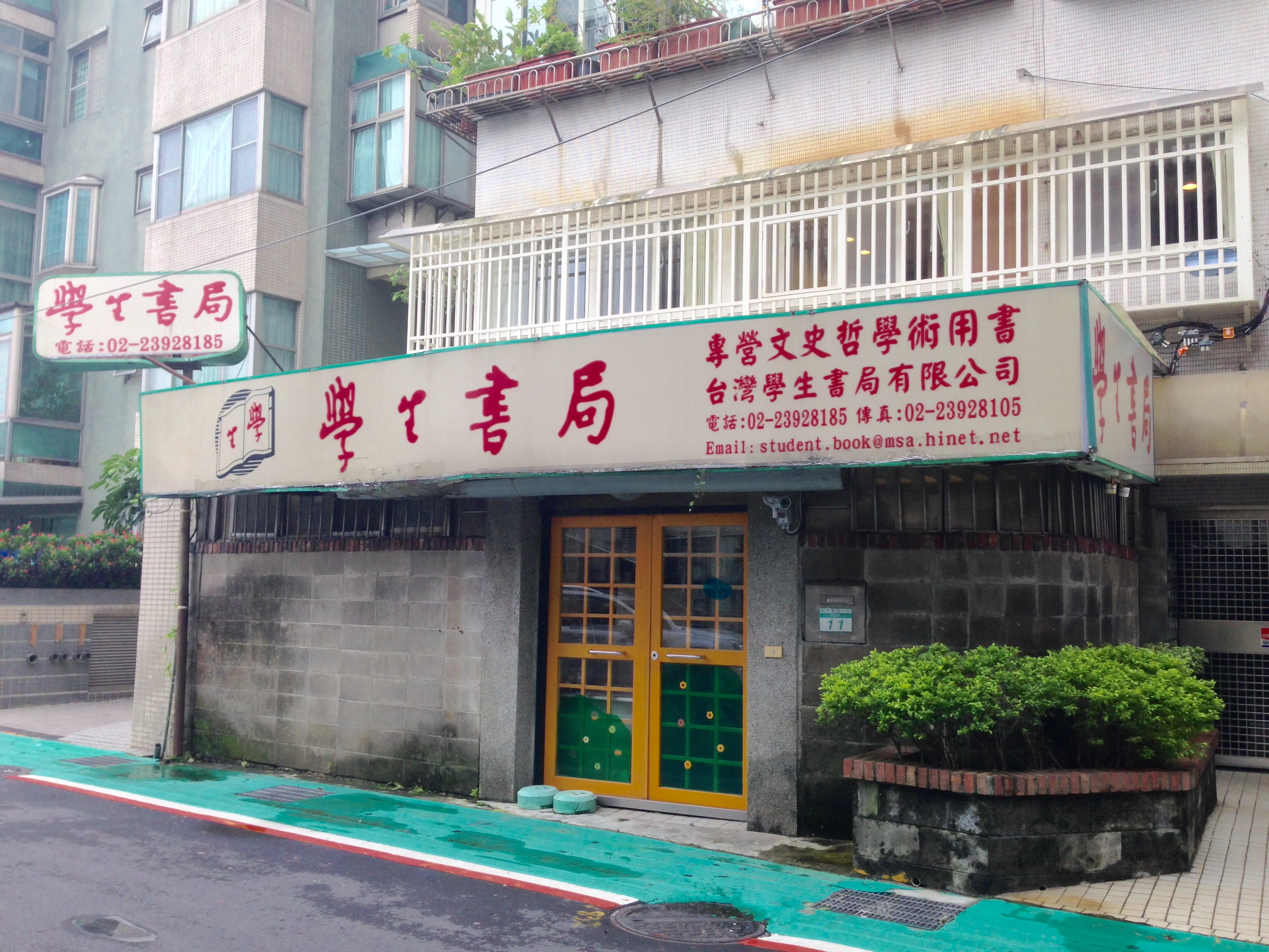 中文（台灣）: 臺灣學生書局總部，位於臺北市大安區和平東路一段75巷11號1樓。